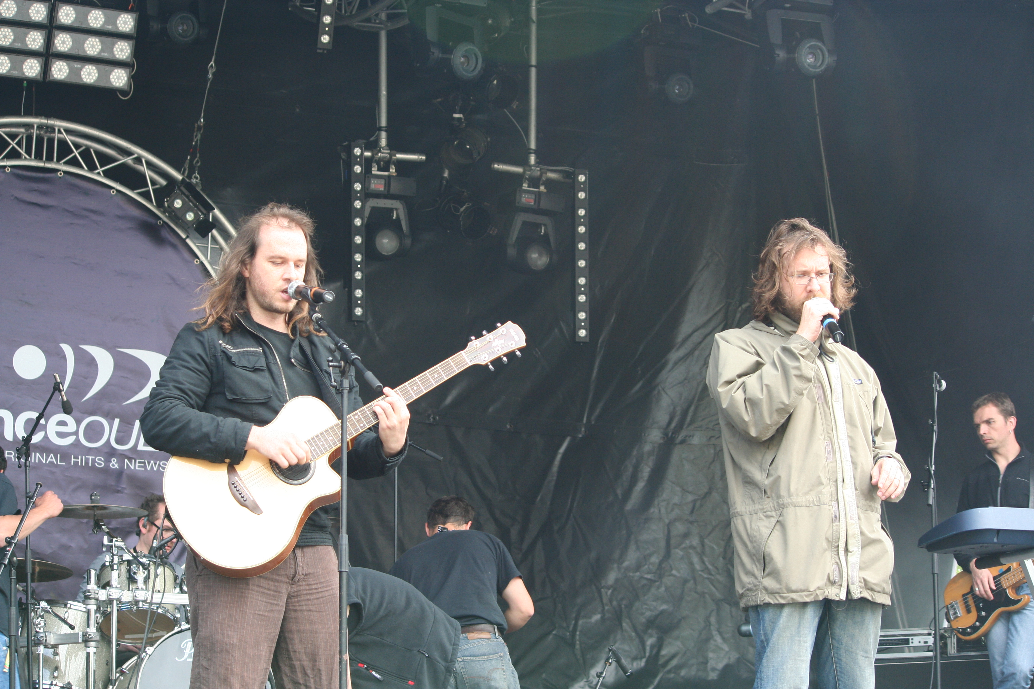 Fête de la Musique à Saint-Lô - France : La Chanson du Dimanche pendant les balances